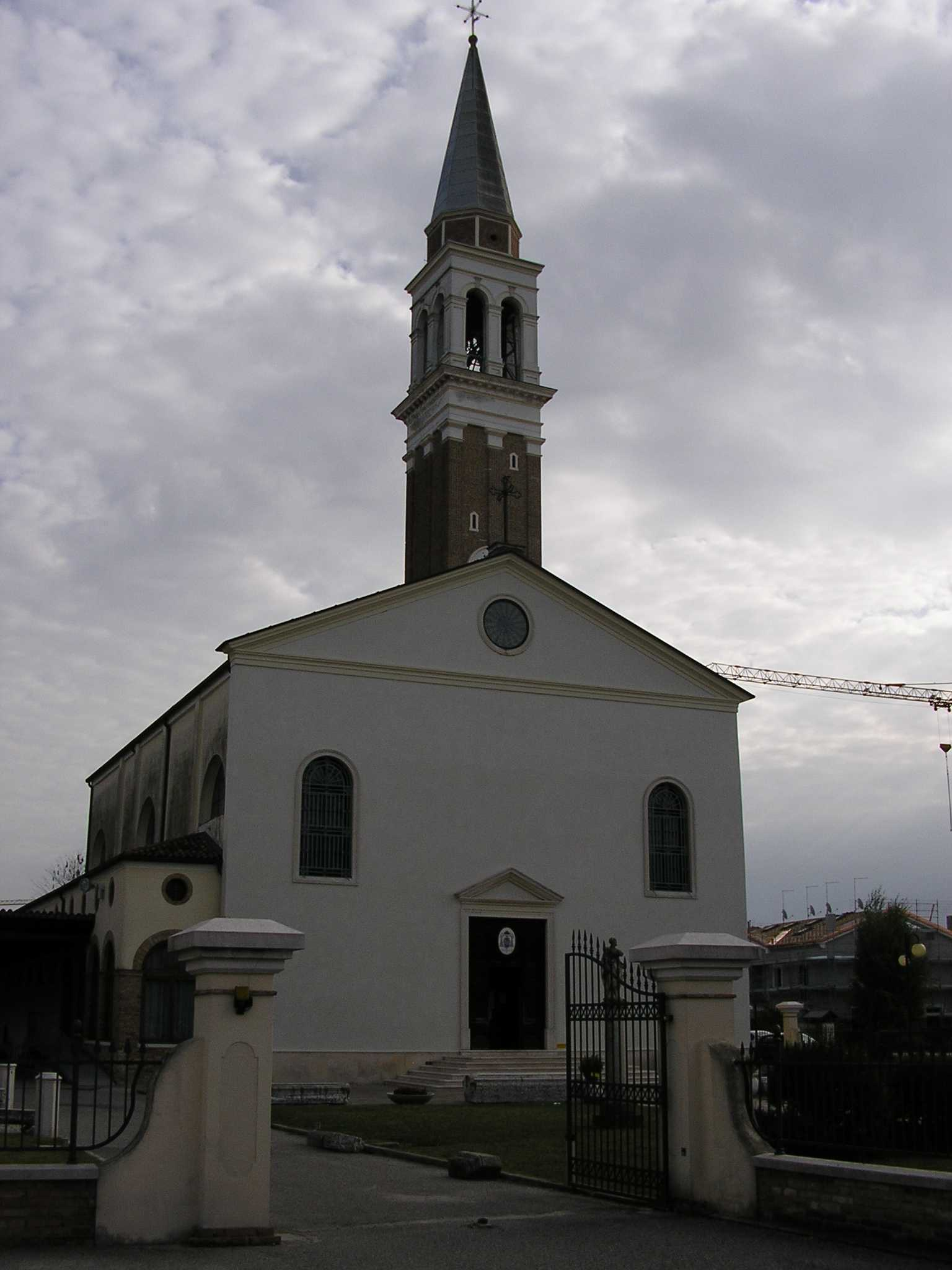 Borbiago, frazione di Mira: la chiesa di Santa Maria Assunta.